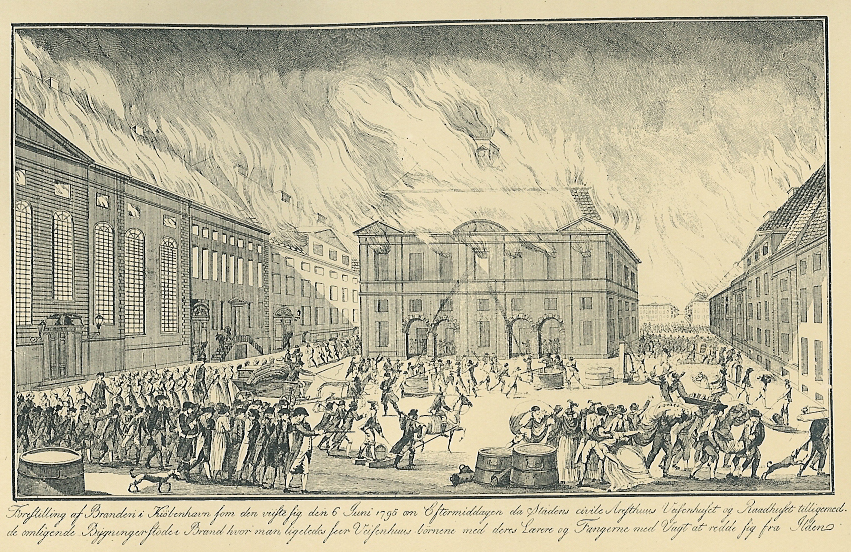 Københavns Brand 6. juni 1795. Billedet forestiller Gammeltorv, med rådhuset i midten.